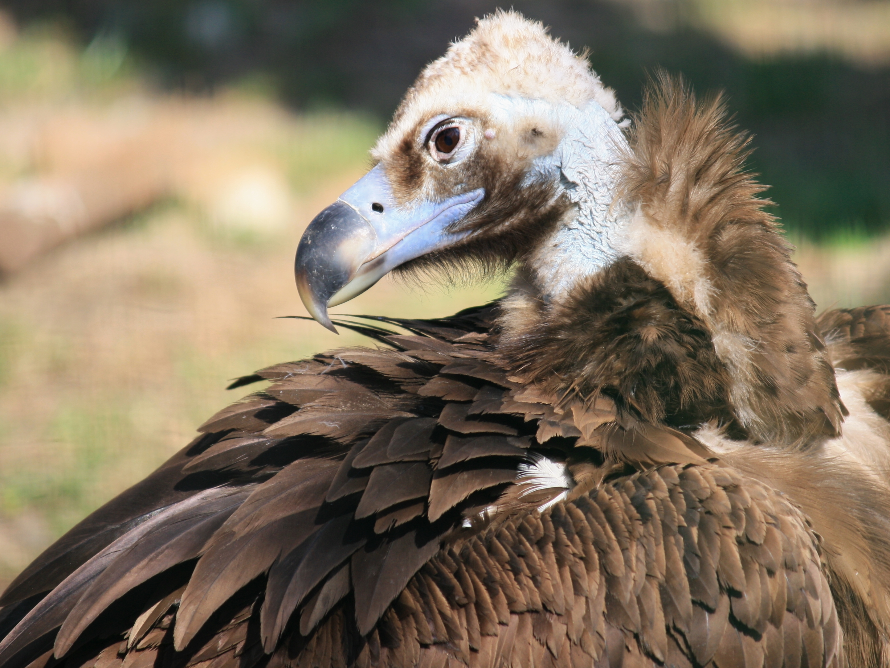 Sup hnědý v pražské Zoo